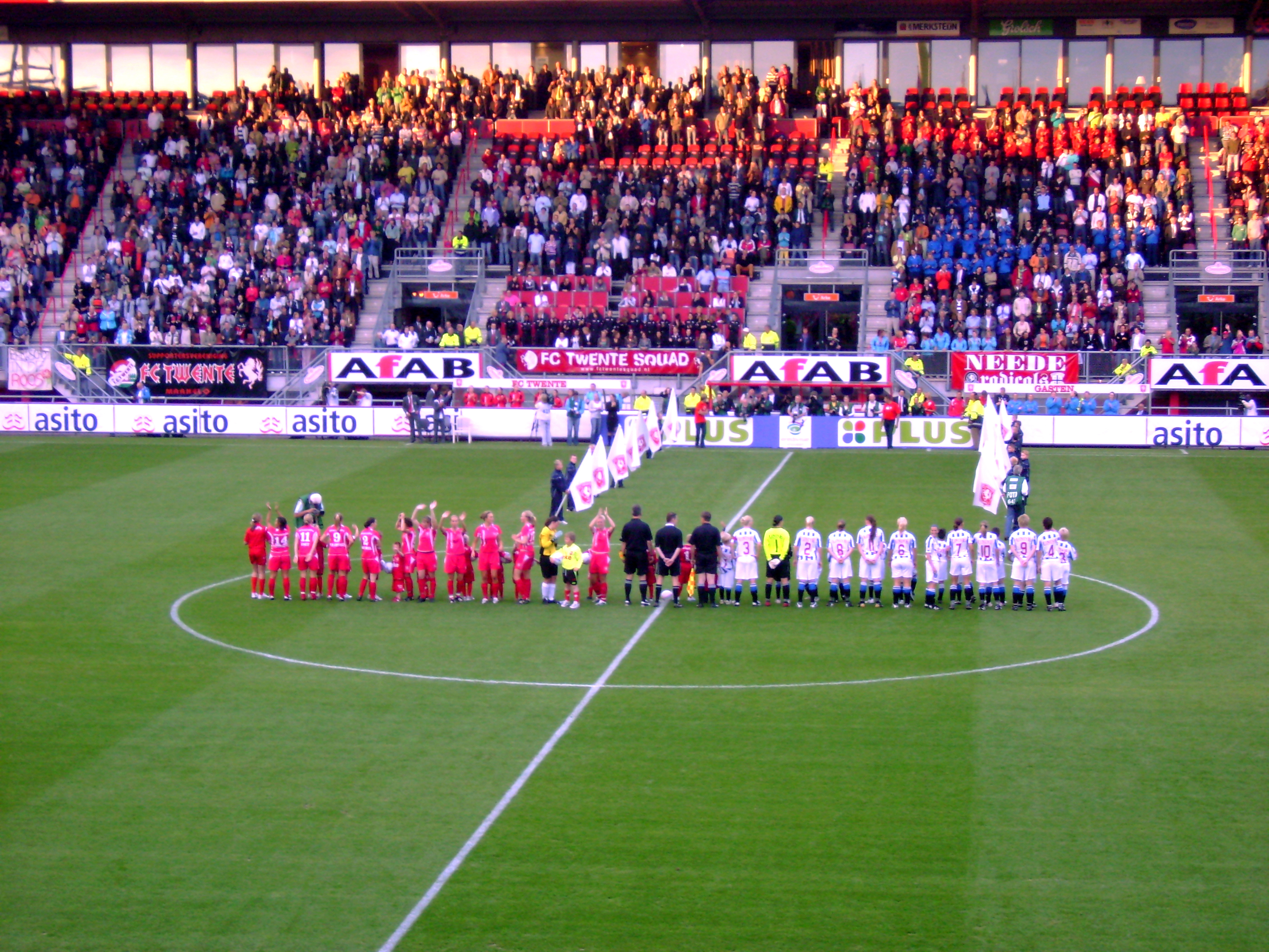 Openingswedstrijd van de voetbaleredivisie voor vrouwen tussen FC Twente en SC Heerenveen in het Arke Stadion in Enschede op 29 augustus 2007.